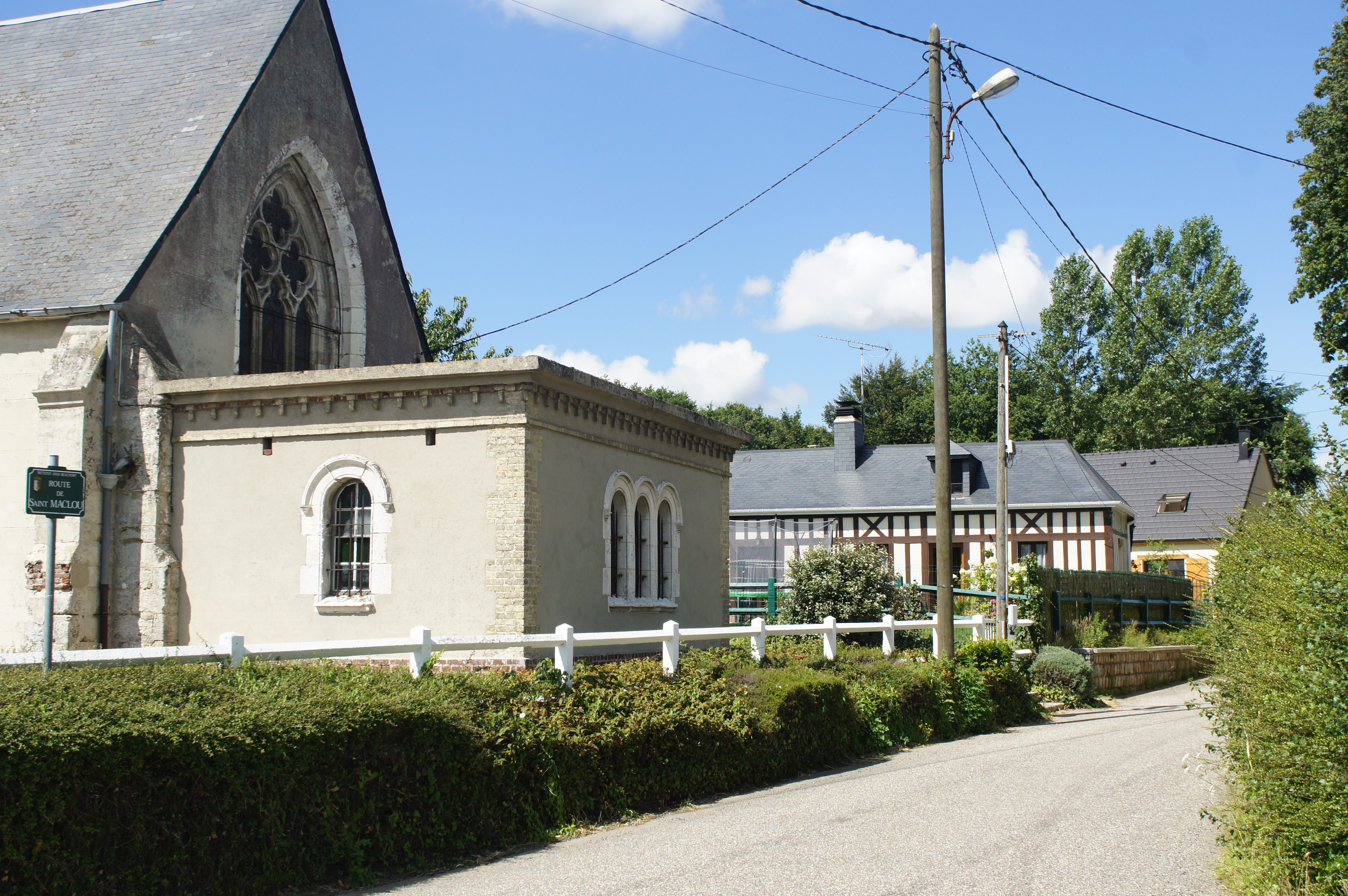 Rue Vattetot-sous-Beaumont